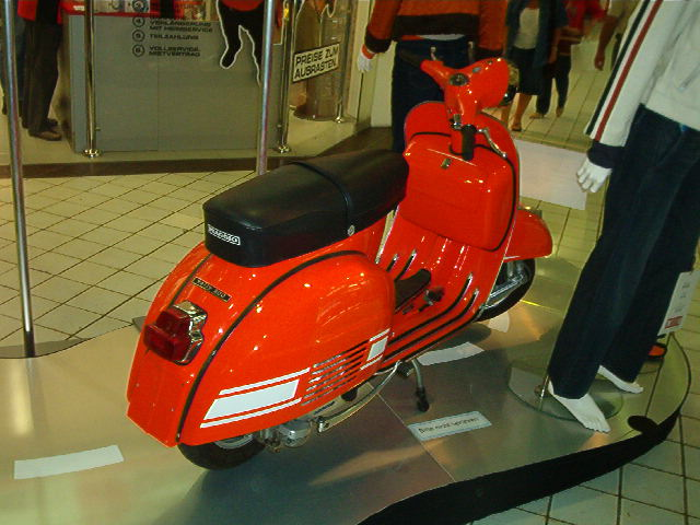 Piaggio Vespa Rally 200 (2) Aufnahmeort: Einkaufszentrum Quelle: Bild selbst aufgenommen Fotograf: M.Huwyler Lizenzstatus: GNU FDL